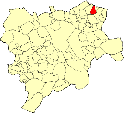 Mapa municipal de Albacete con el municipio de Alborea resaltado en rojo.